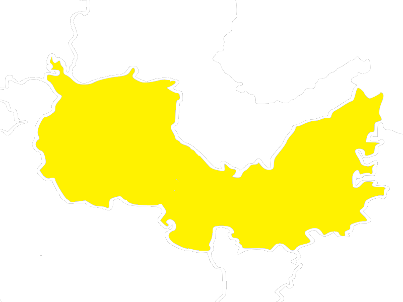 Región Sierra Norte, una de las ocho regiones que conforman al estado mexicano de Oaxaca.